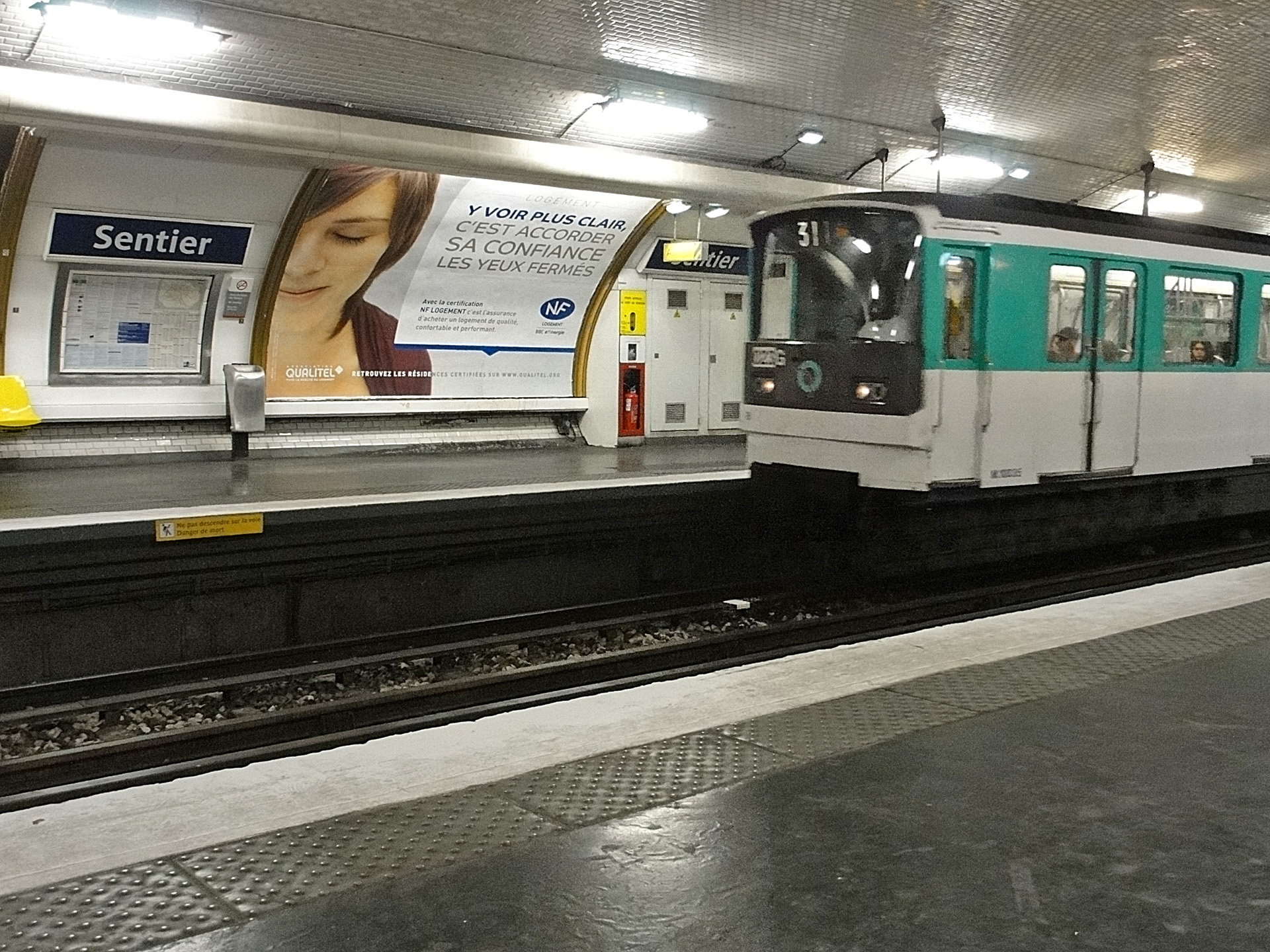 Station Sentier de la ligne 3 du métro de Paris, France.